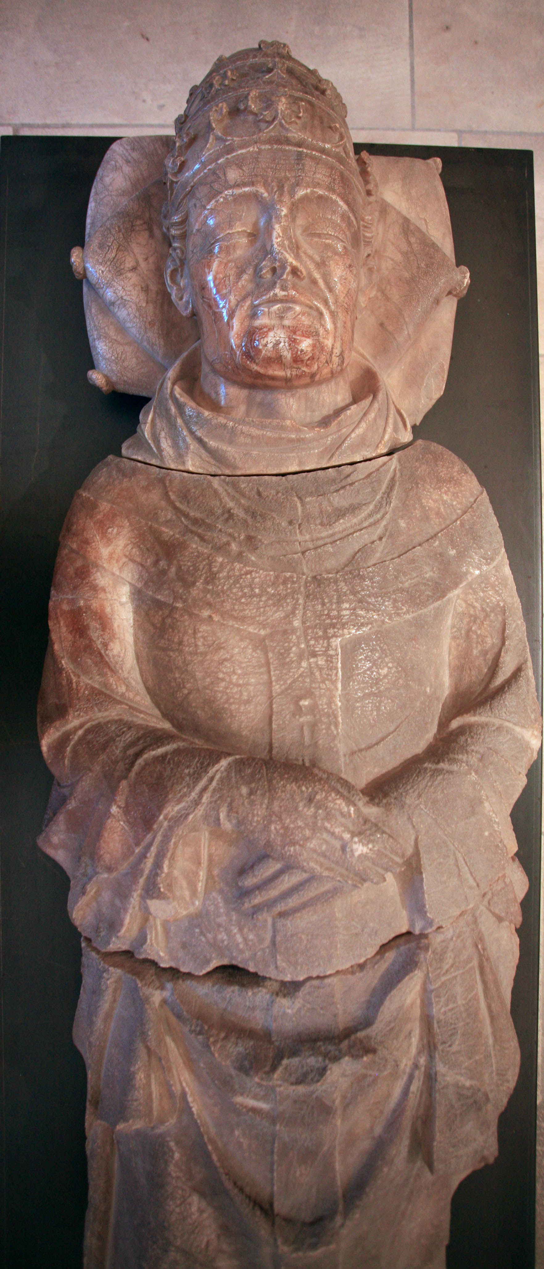 Tête et torse du gisant du Pape Urbain V (1370), Avignon église du Collège Bénédictin de Saint-Martial - origine : Musée petit palais